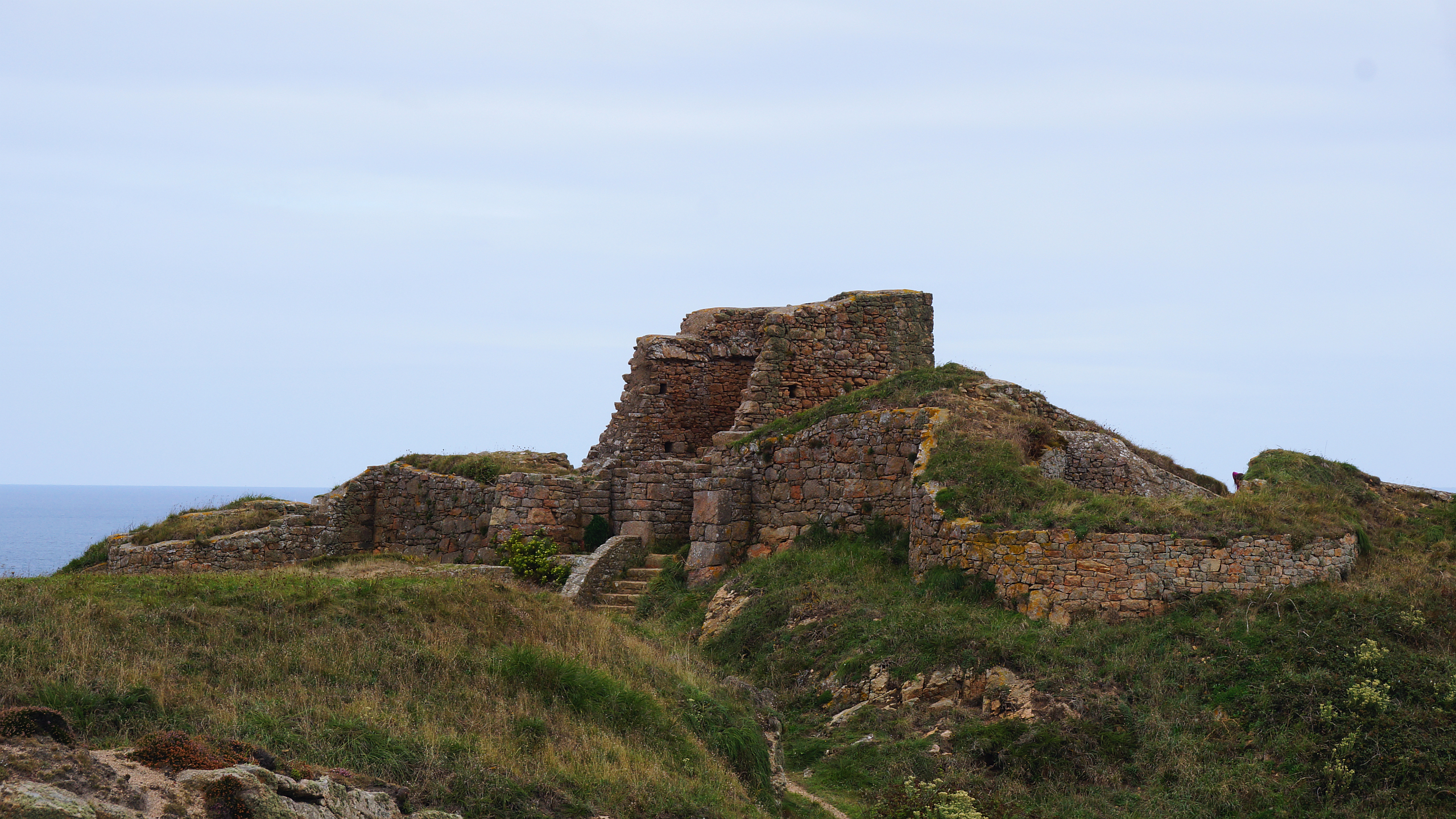 Grosnez Castle in the northwest of Island of Jersey - Channel Islands UK United Kingdom of Great Britain - Kanalinseln Großbritannien Foto 2017 Wolfgang Pehlemann DSC04967